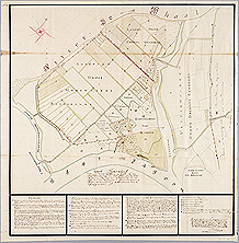 Kaart van Heerewaarden, 1790